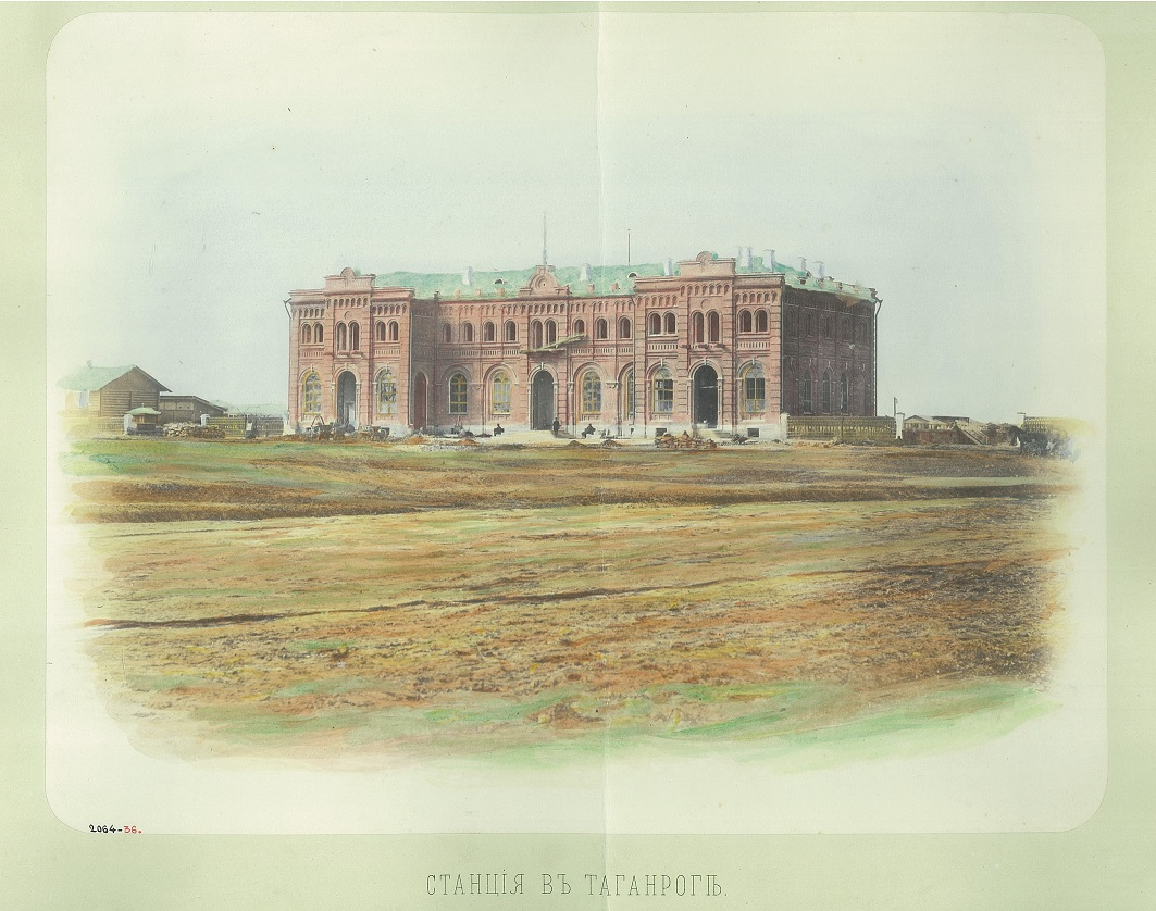 Вокзал в Таганроге